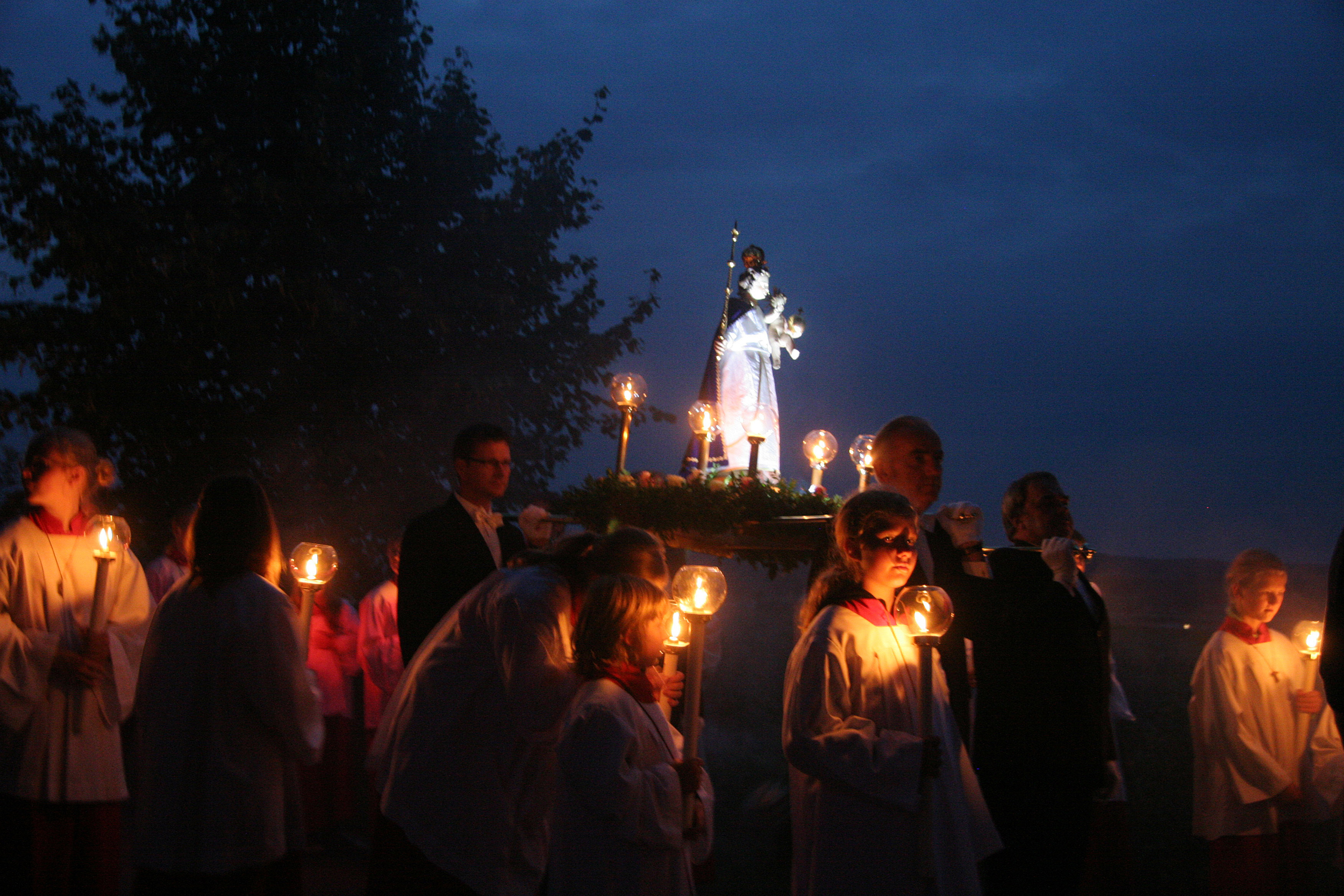 Lichterprozession auf dem Höherberg am Fest Mariä Himmelfahrt